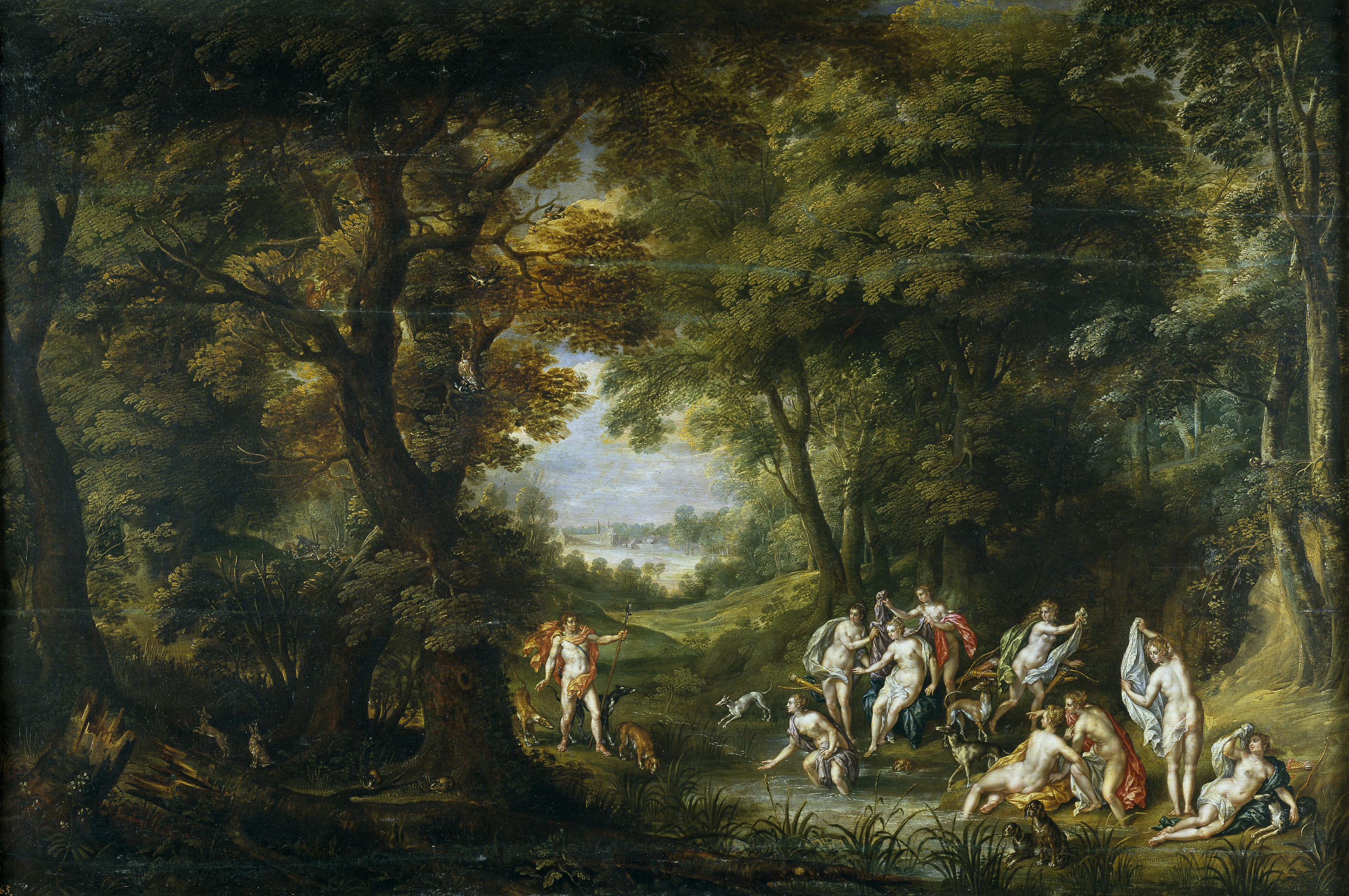 Paisaje con Diana y Acteóntitle QS:P1476,es:"Paisaje con Diana y Acteón" label QS:Les,"Paisaje con Diana y Acteón"